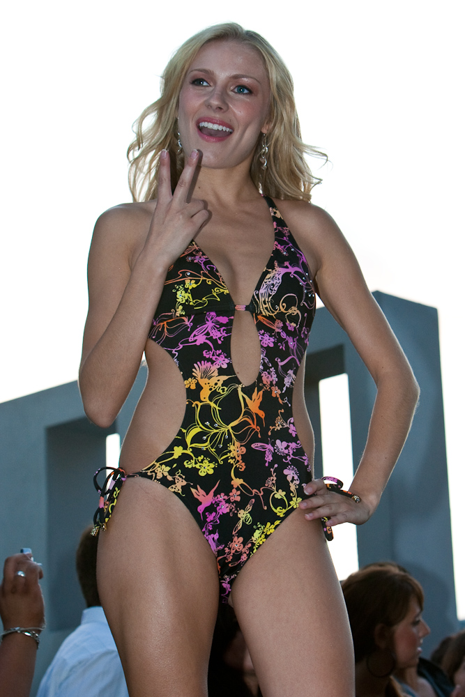 Eco-Panda Show